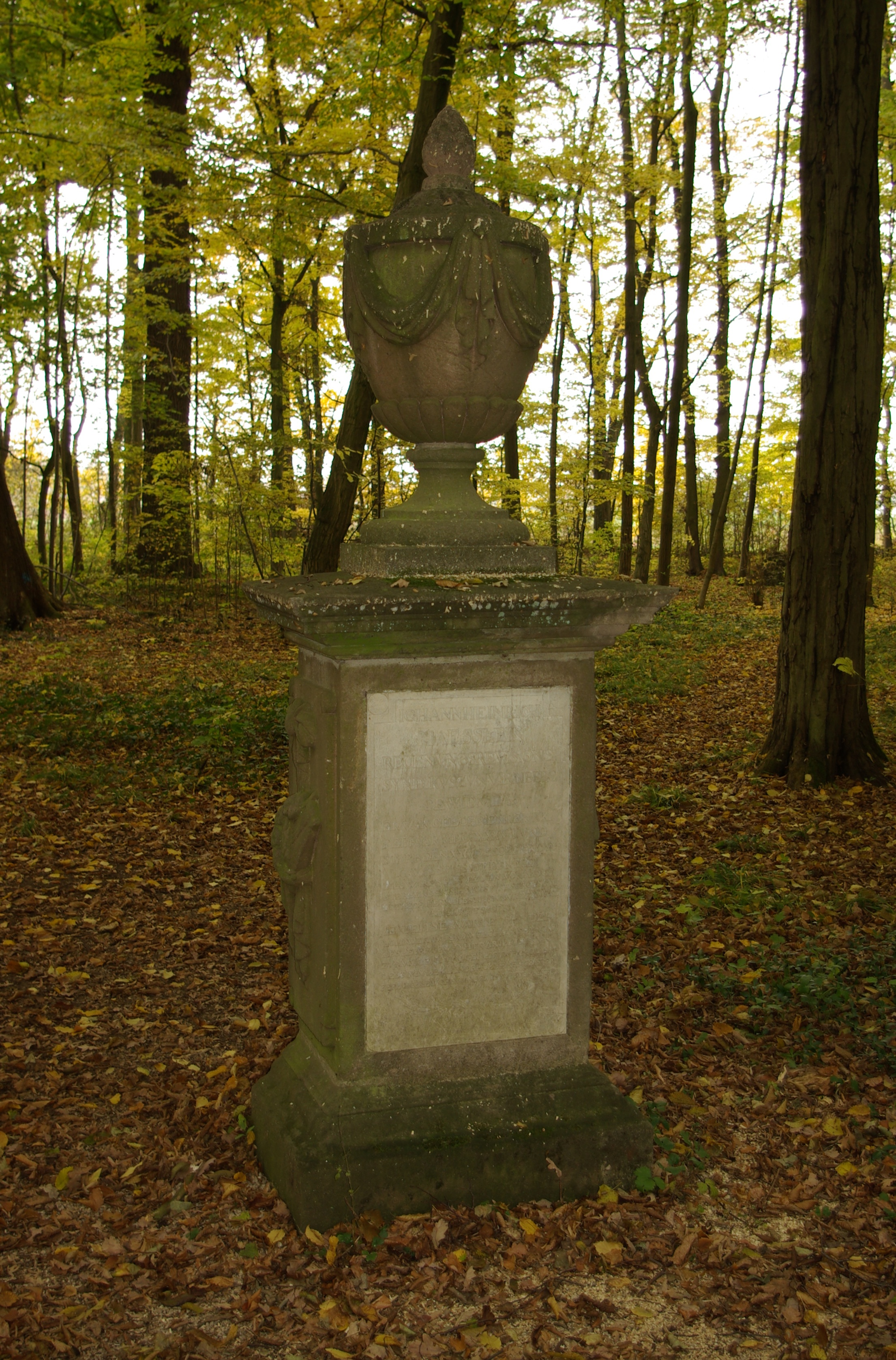 Gedenkstein für Johann Heinrich Häßlein im Irrhain bei Kraftshof. Dieser Teil der Anlage wurde als Scheinfriedhof gestaltet.